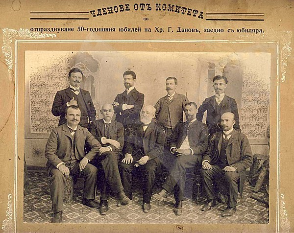 Честване на 50 години книгоиздателска дейност. Членовете на юбилейния комитет: Серафим Иванов Барутчийски, Иван Илиев Мавров, Христо Г. Данов, Павел Жилков, Стефан П. Чолаков, Панайот Мутафчиев - първият прав от ляво на дясно, Стефан Георгиев (екзарх Стефан) - вторият прав от ляво на дясно, Атанас Брашнаров - третият прав от ляво на дясно.